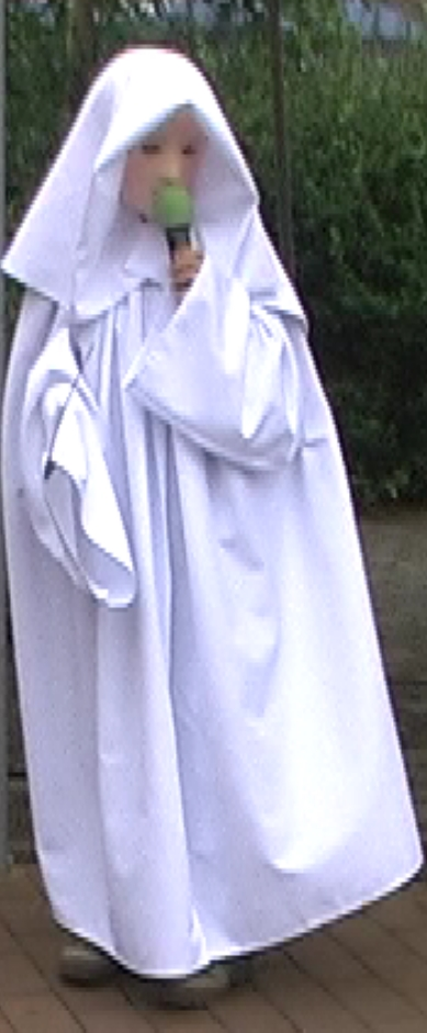 Kind aus dem Spreewald stellt die Mittagsfrau dar